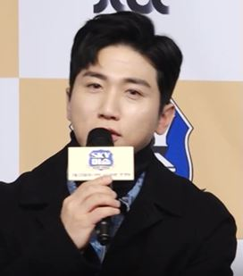 디스패치 구독 클릭! Dispatch Subscribe